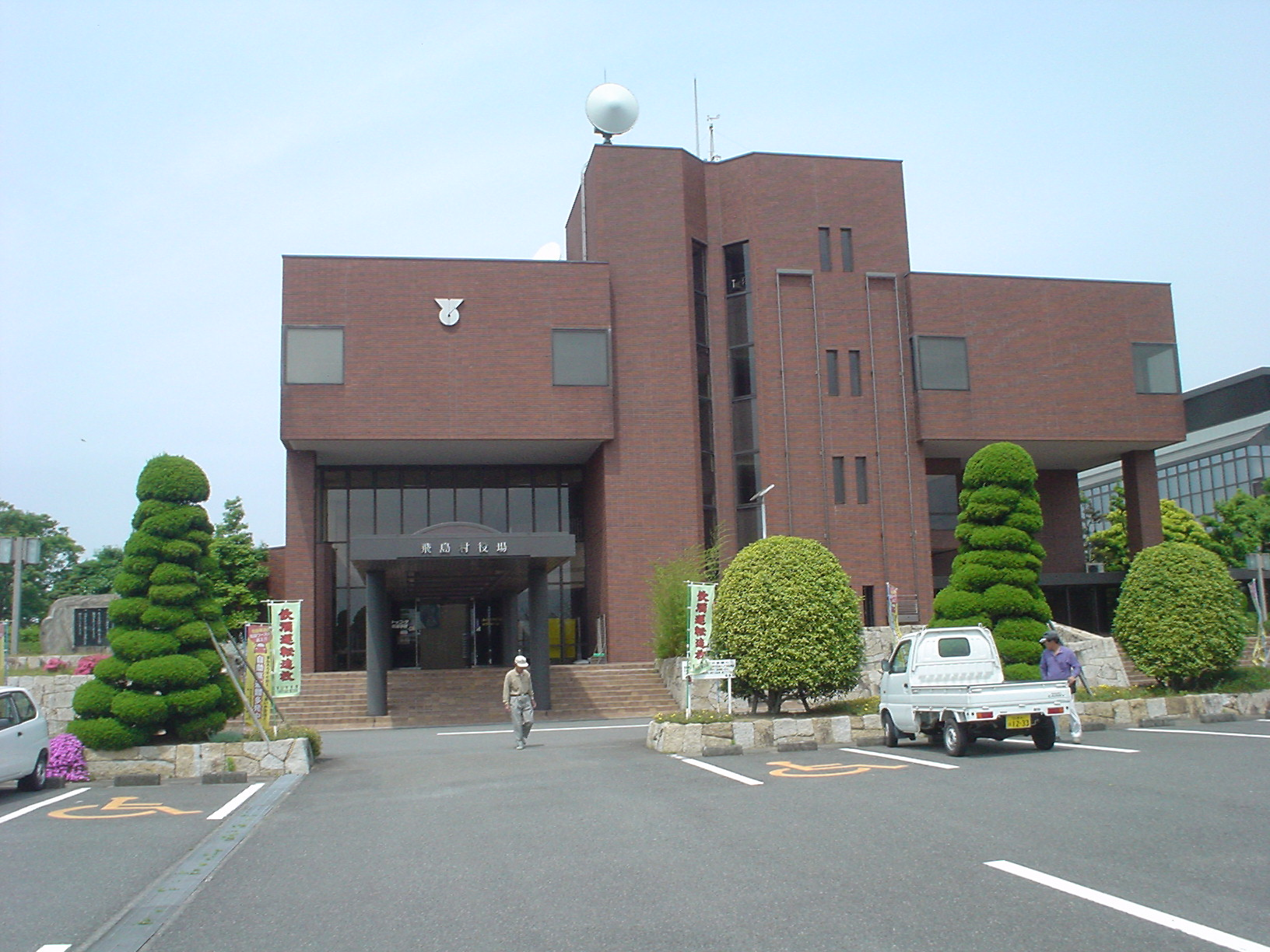 飛島村役場